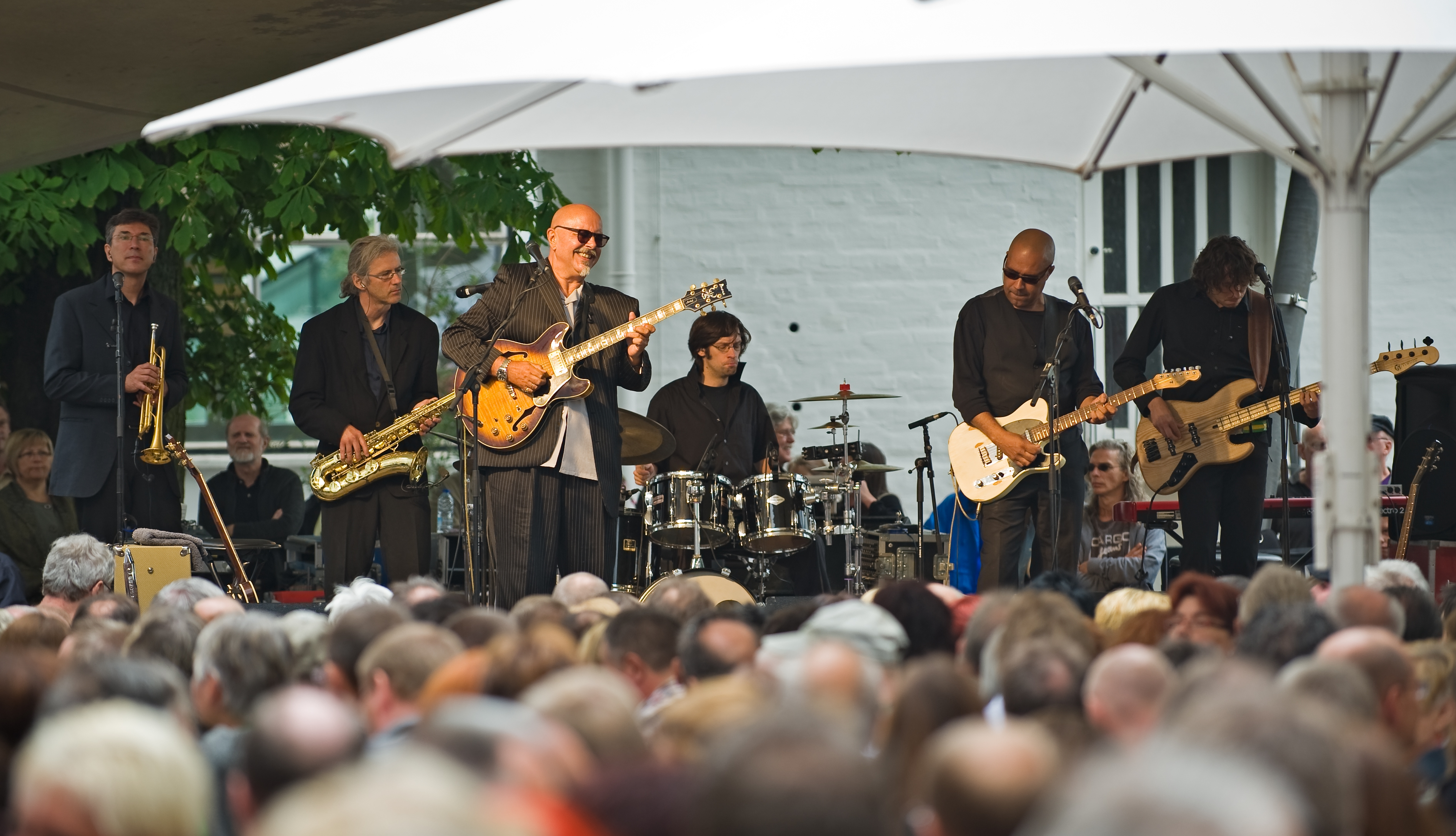 Blues Company bei einem Auftritt in Saabrücken, der Reihe "Sonntag ans Schloss".